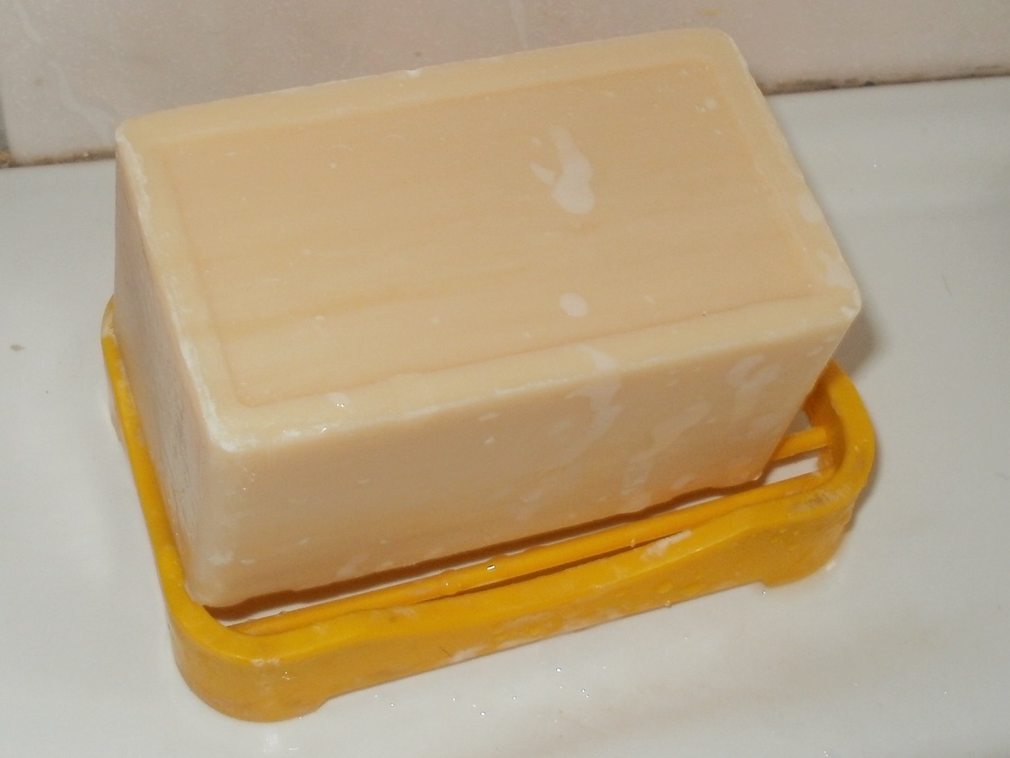 Mydło "Biały Jeleń" wyprodukowane w 2011 roku.